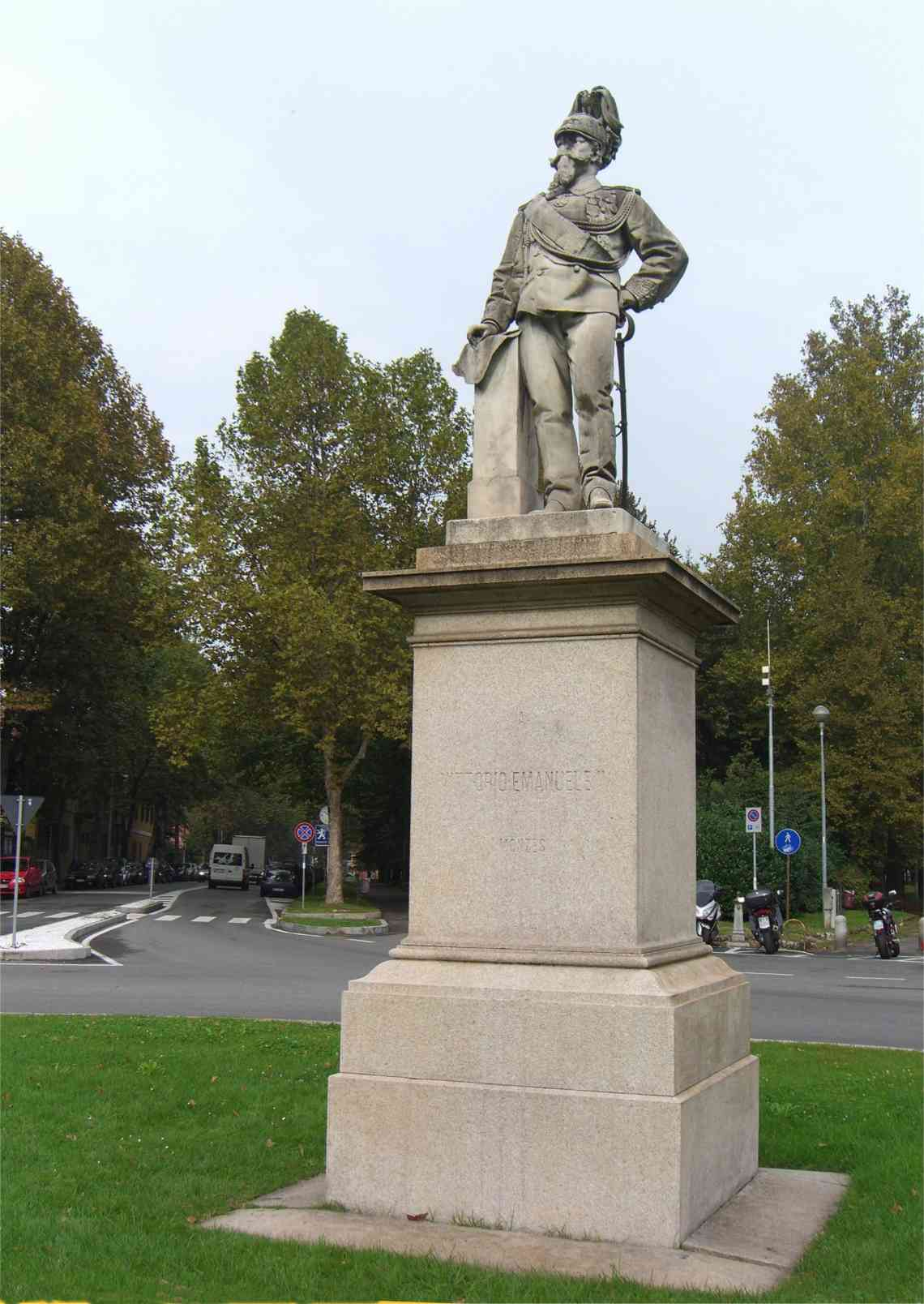 MB Monza monumento dedicato a Vittorio Emanuele II in piazza Gianni Citterio. Sullo sfondo a sinistra l'inizio di viale Regina Margherita che costeggia i Boschetti reali.